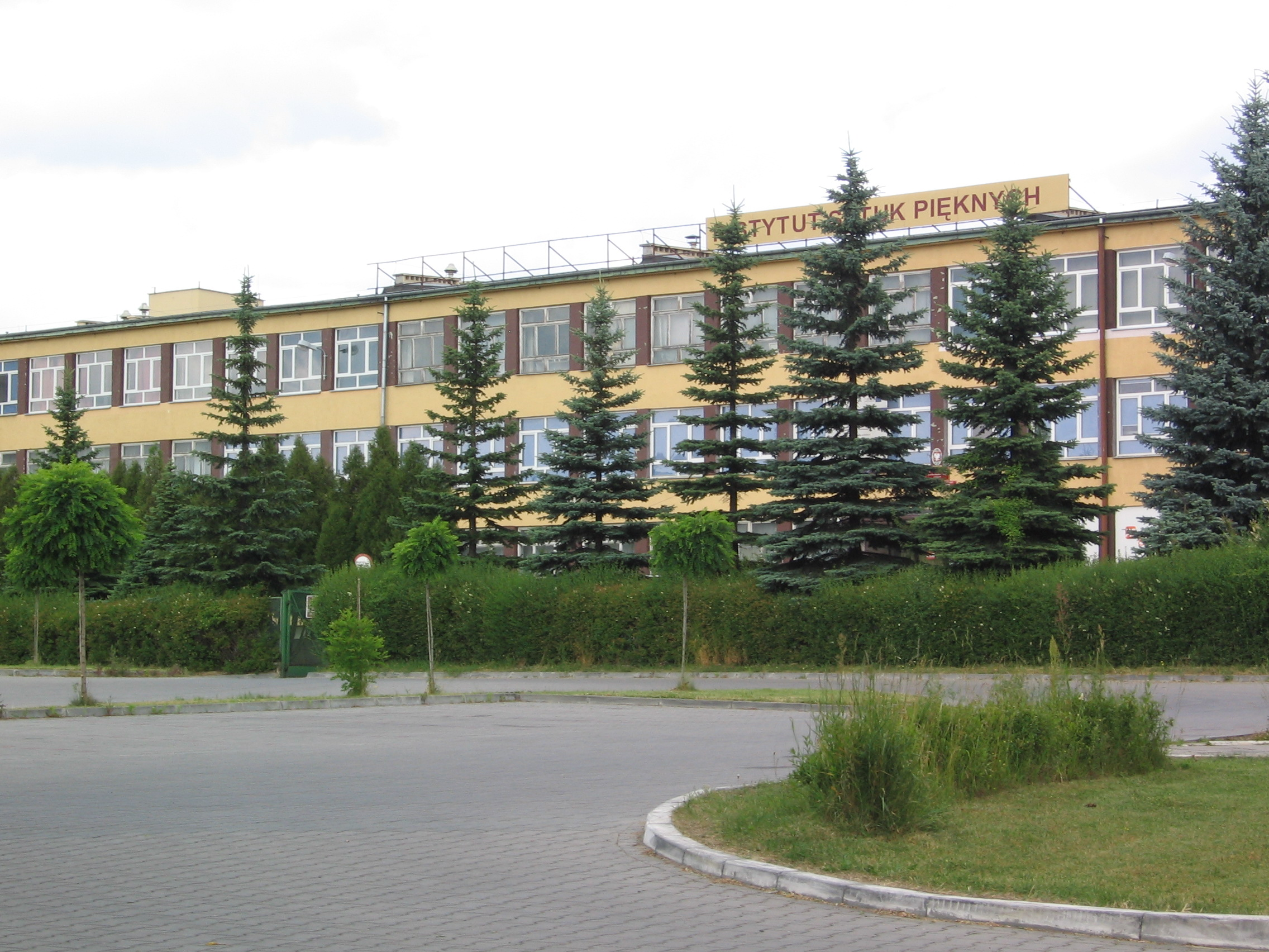 Instytut Sztuk Pięknych UJK w Kielcach przy ul. Podklasztornej.